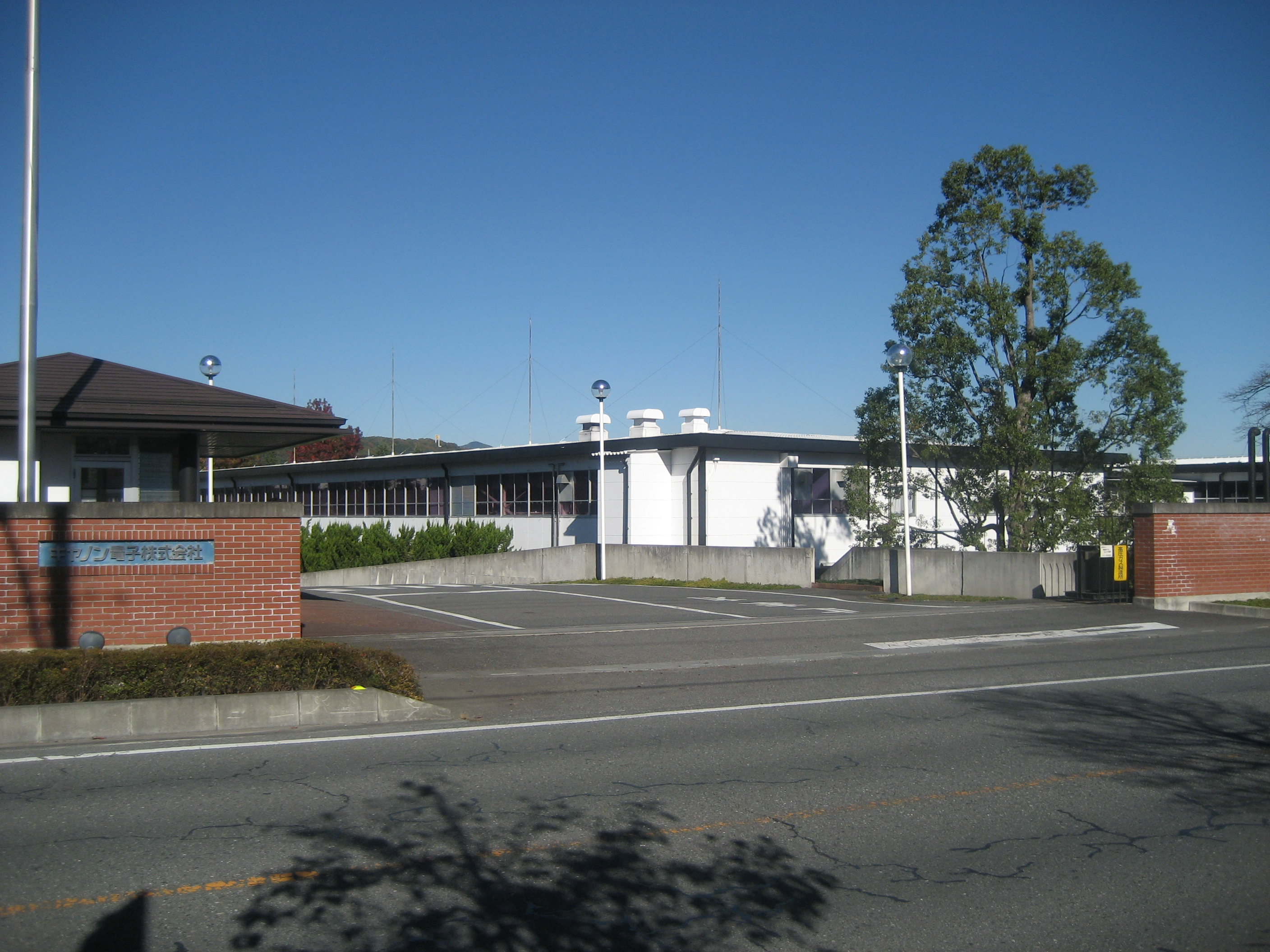 キヤノン電子本社（入口付近を撮影）